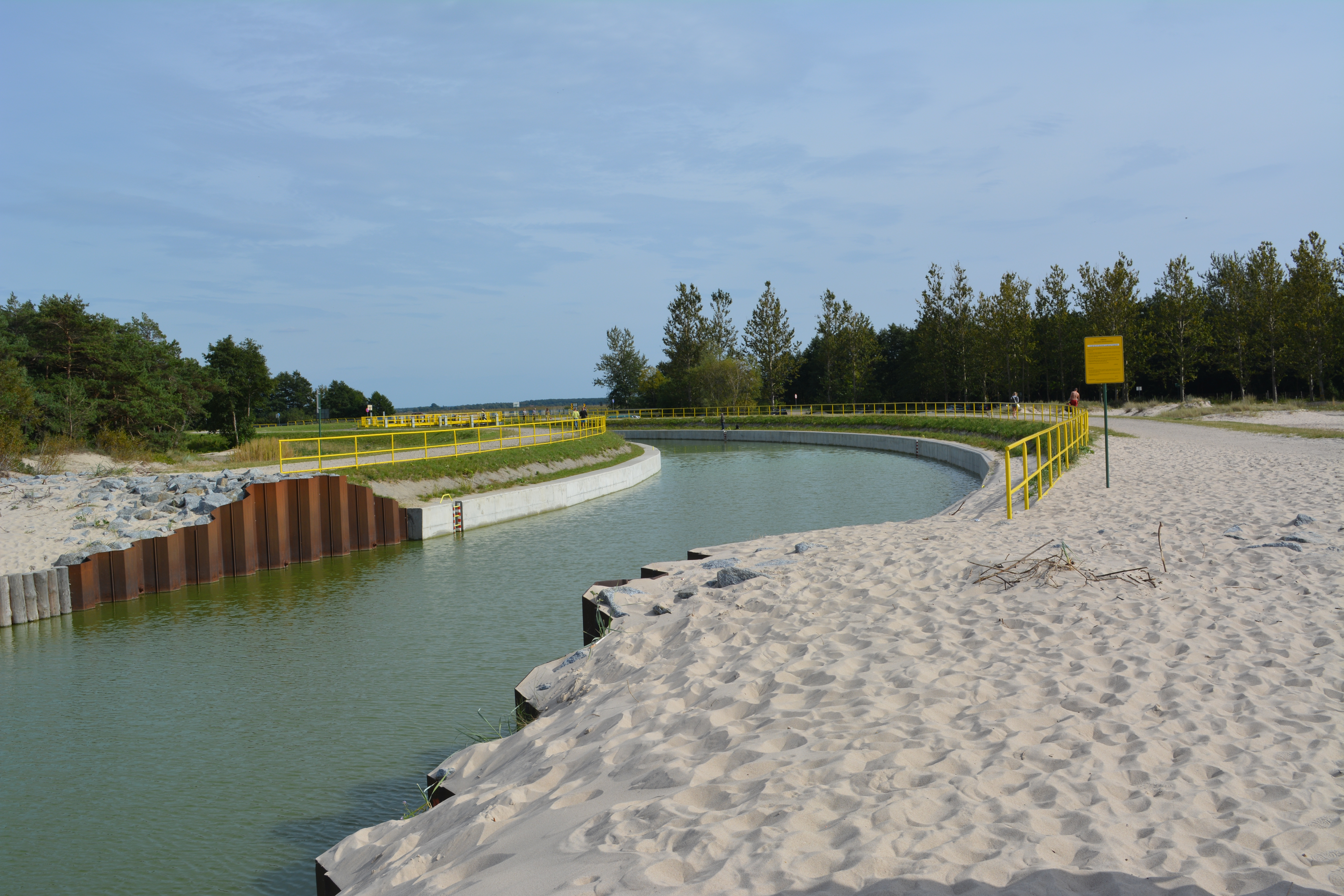 Kanal verbindet den Jamunder See mit der Ostsee auf der Nehrung zwischen Uniescie und Lazy